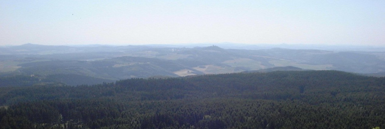 Blick von der Hohen Acht auf die Nürburg